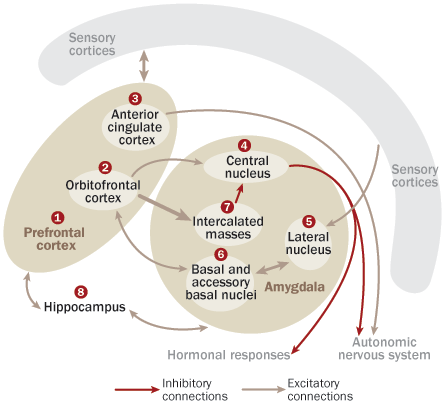 Principales núcleos, aferencias y proyecciones en la amígdala cerebral